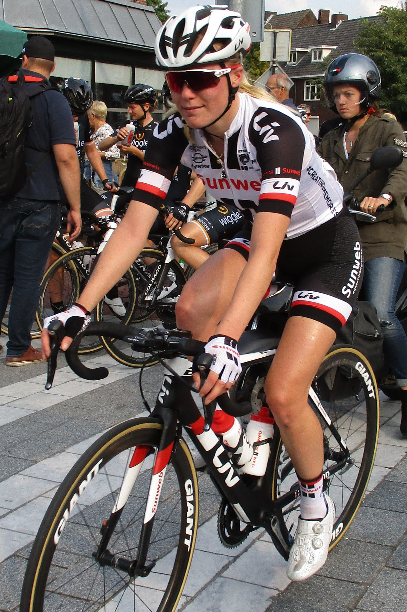 4e etappe van de Boels Ladies Tour 2017 door Noord-Limburg, finish in Weert.